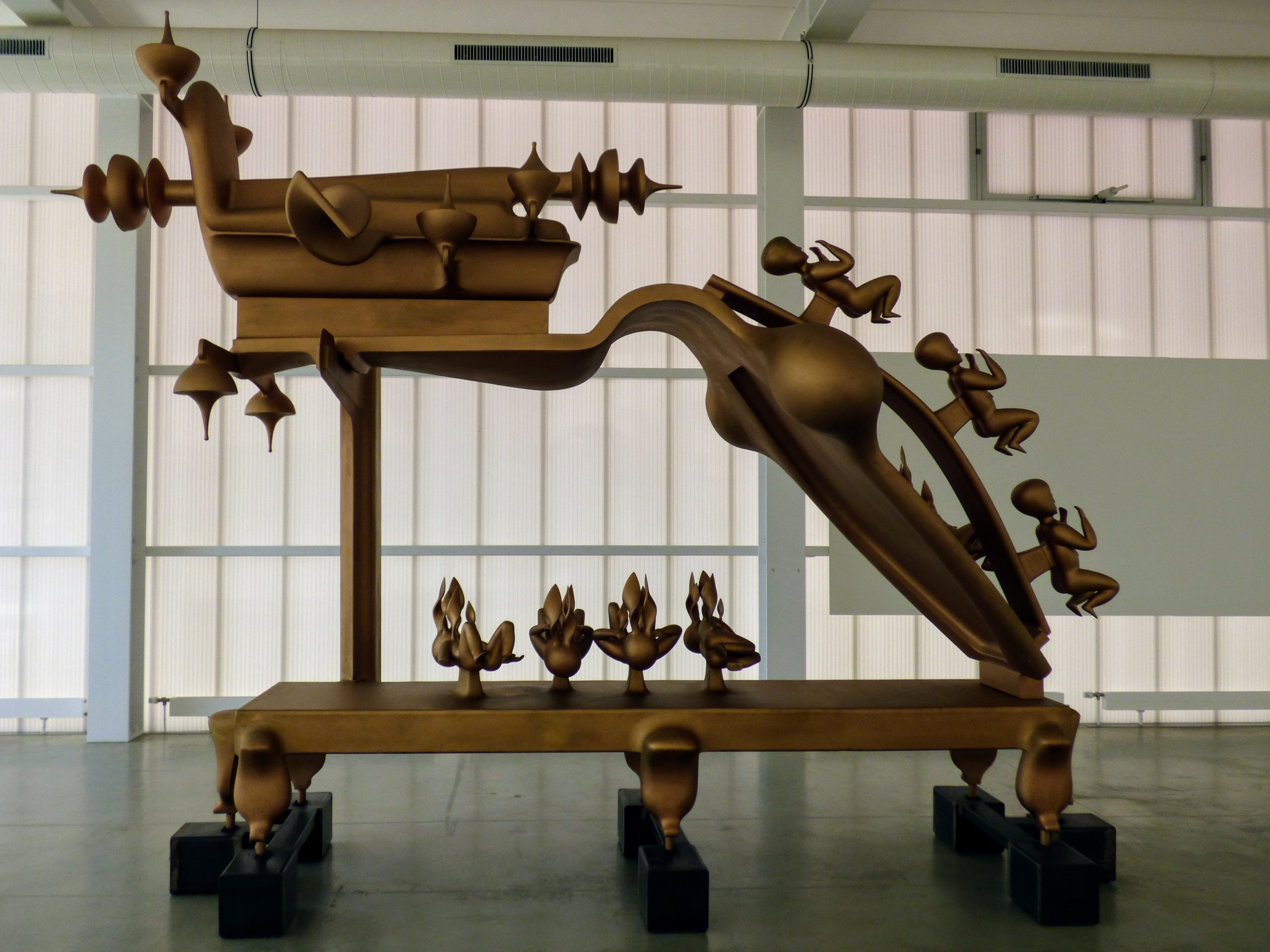 Schloss Herberstein, Steiermark: Gironcoli-Museum in Nebengebäude, Skulptur von Bruno Gironcoli